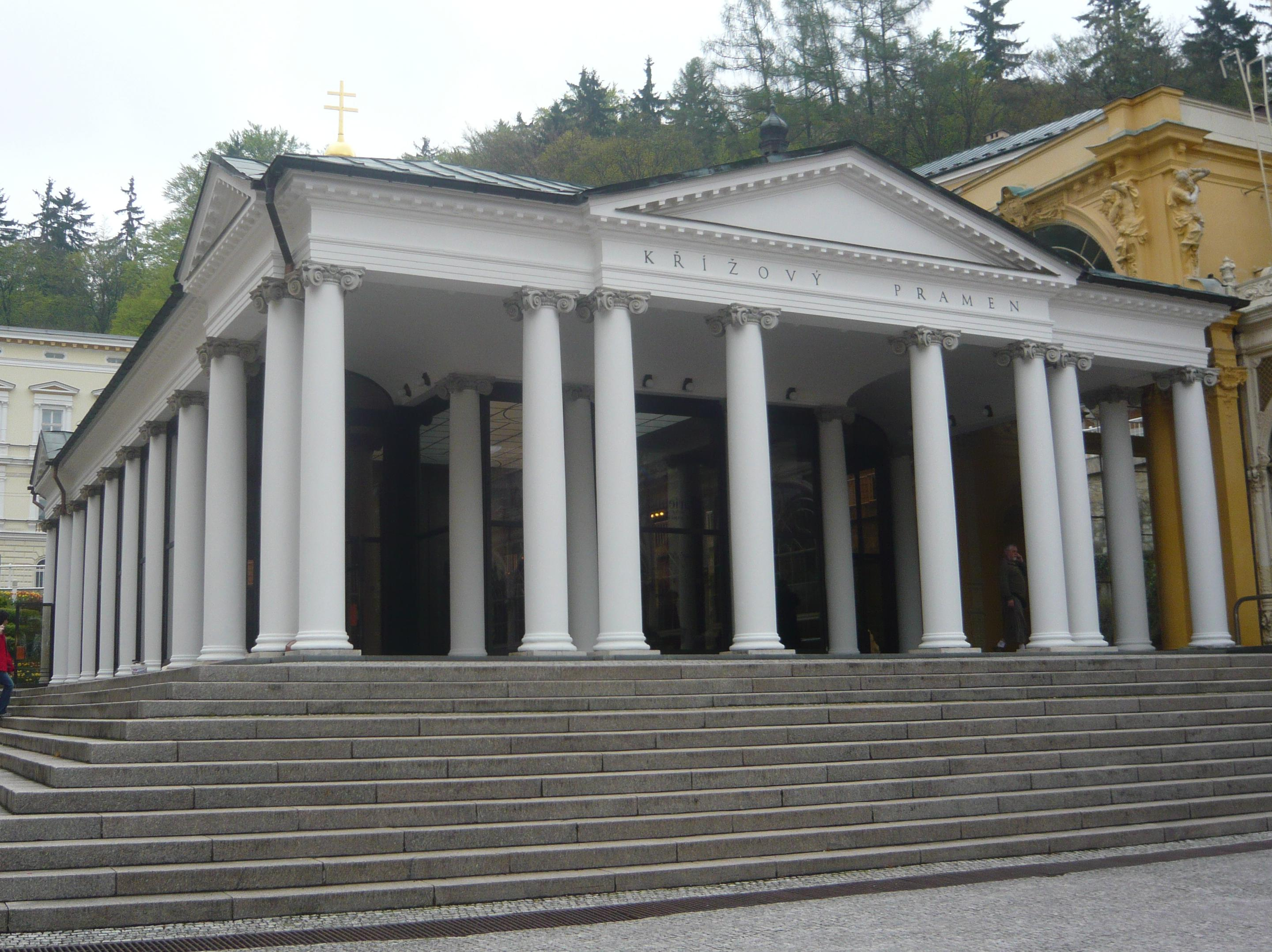 Kolonáda Křížového pramene, Mariánské Lázně